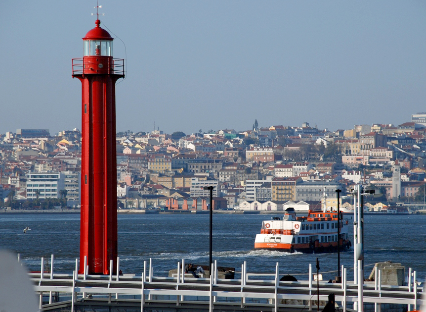 Farol de Cacilhas, Almada, Lisboa, Portugal.